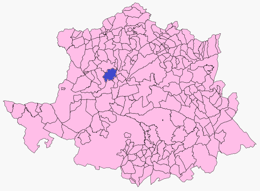 Situación del término municipal de Torrejoncillo respecto a la provincia de Cáceres, en España.